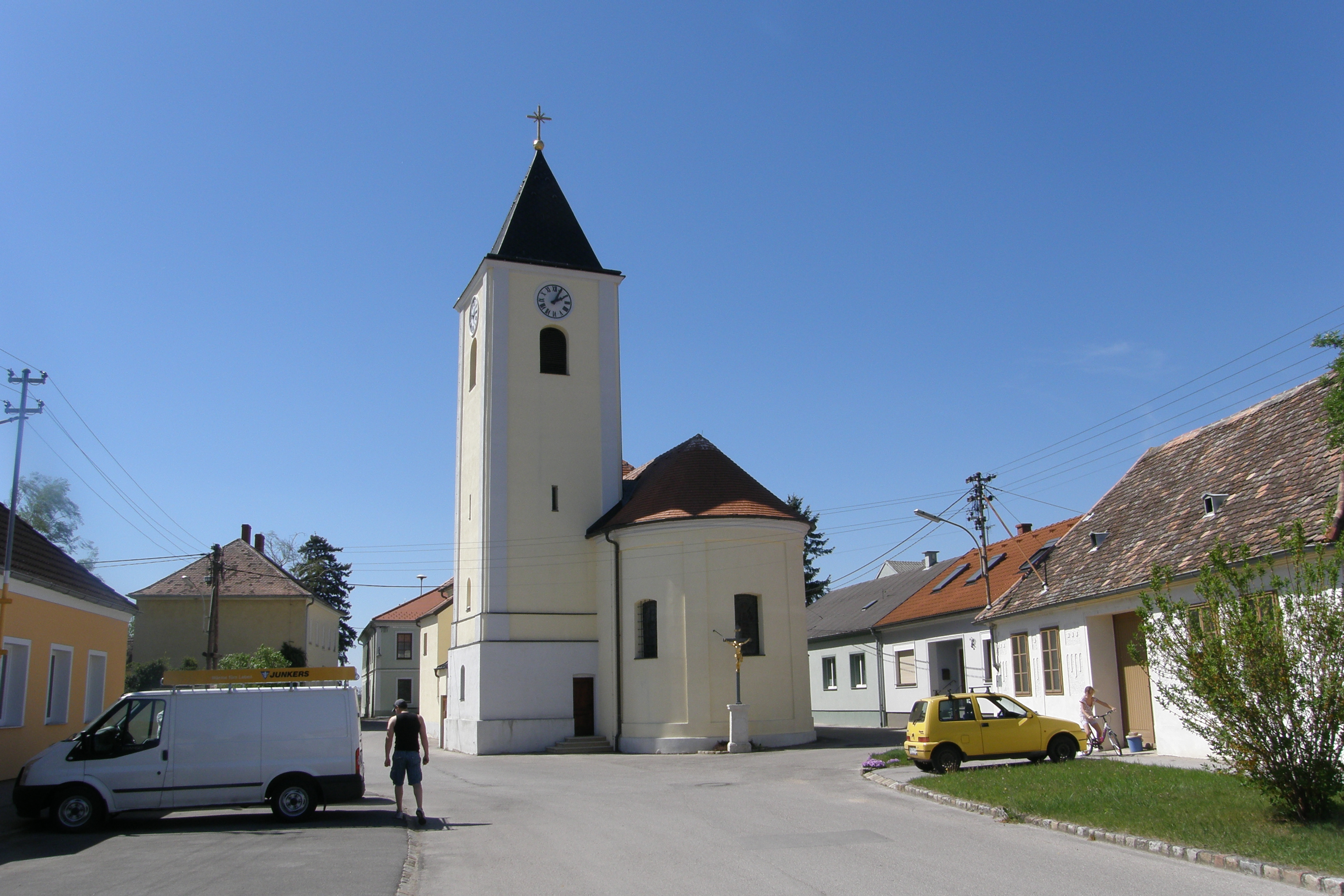 Kath. Pfarrkirche hl. Laurentius